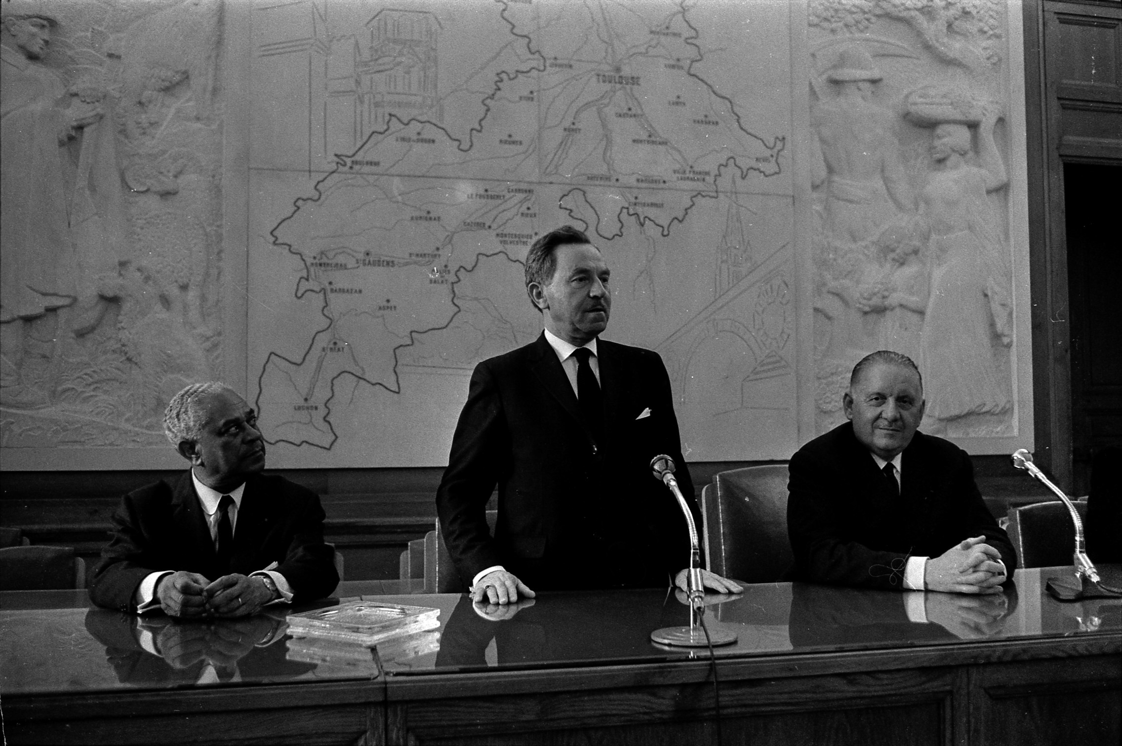 Pas de lieu. Le 23 Avril 1969. Vue de messieurs Poher, Monnerville et Eeckhoutte donnant une conférence de presse.